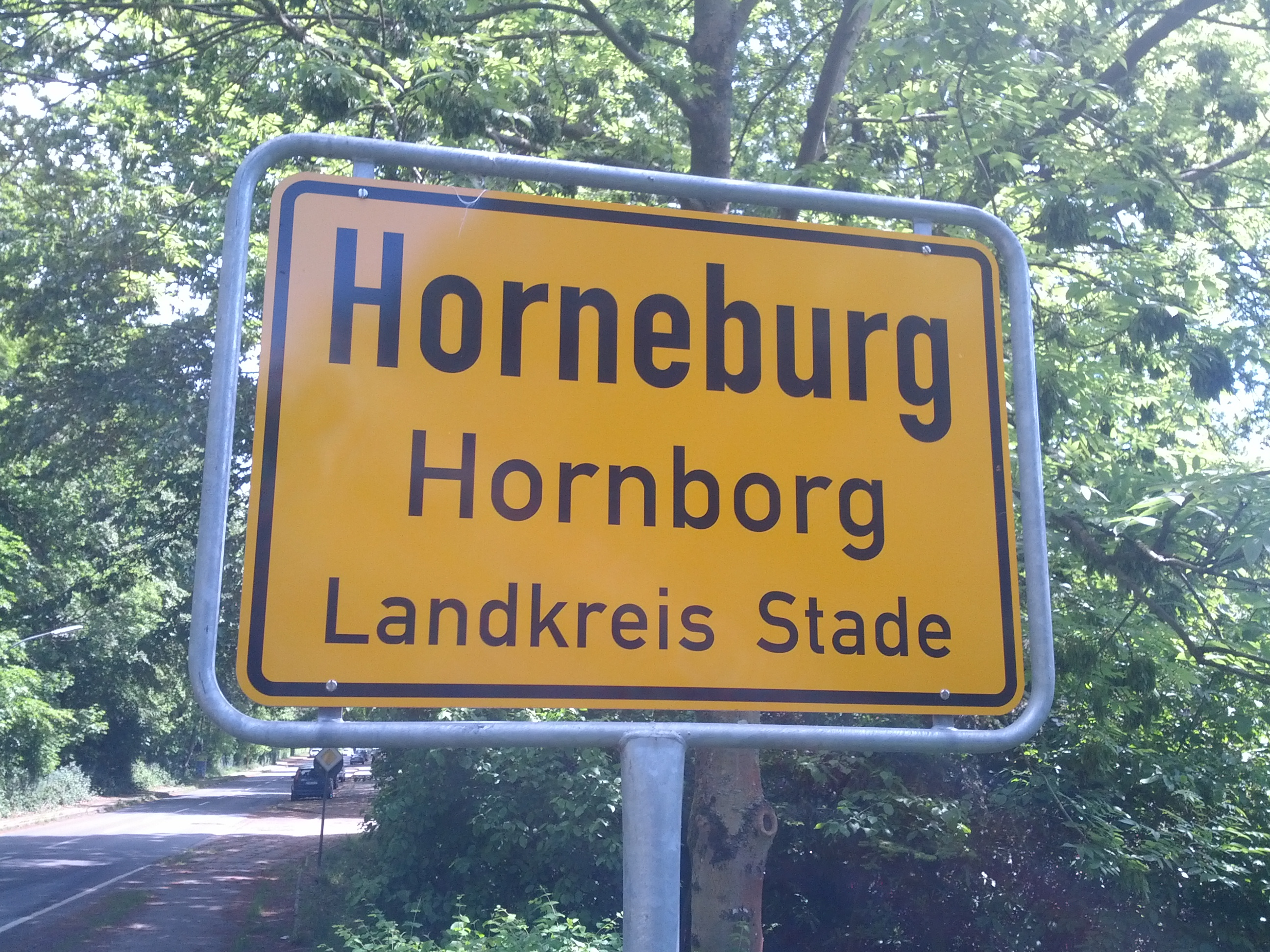 Ortsschild von Hornborg, Landkreis Stood, mit den Naam op Hoochdüütsch un op Plattdüütsch